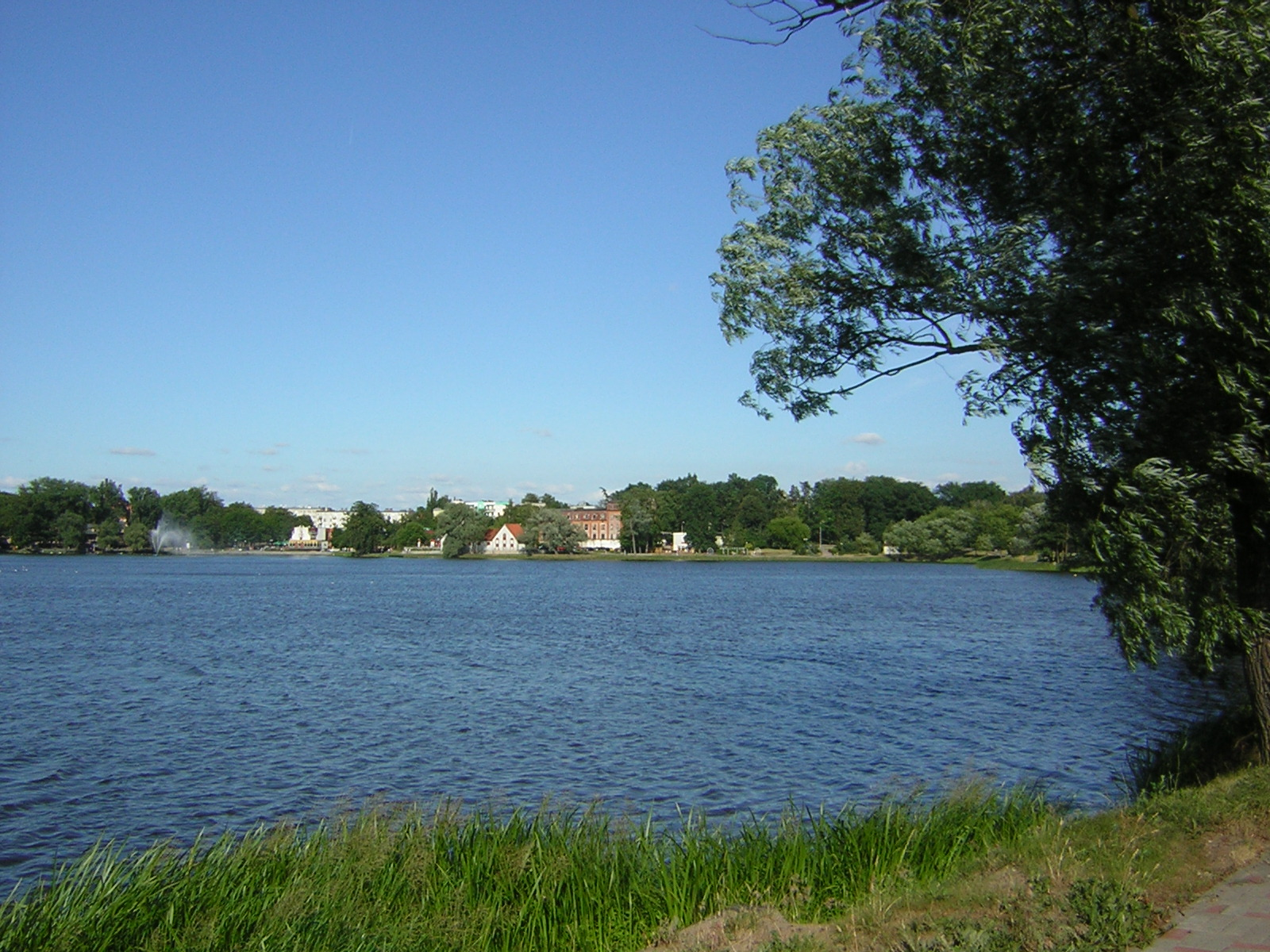 Mały Jeziorak w Iławie